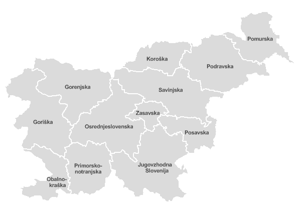 Regionalizacija Slovenije